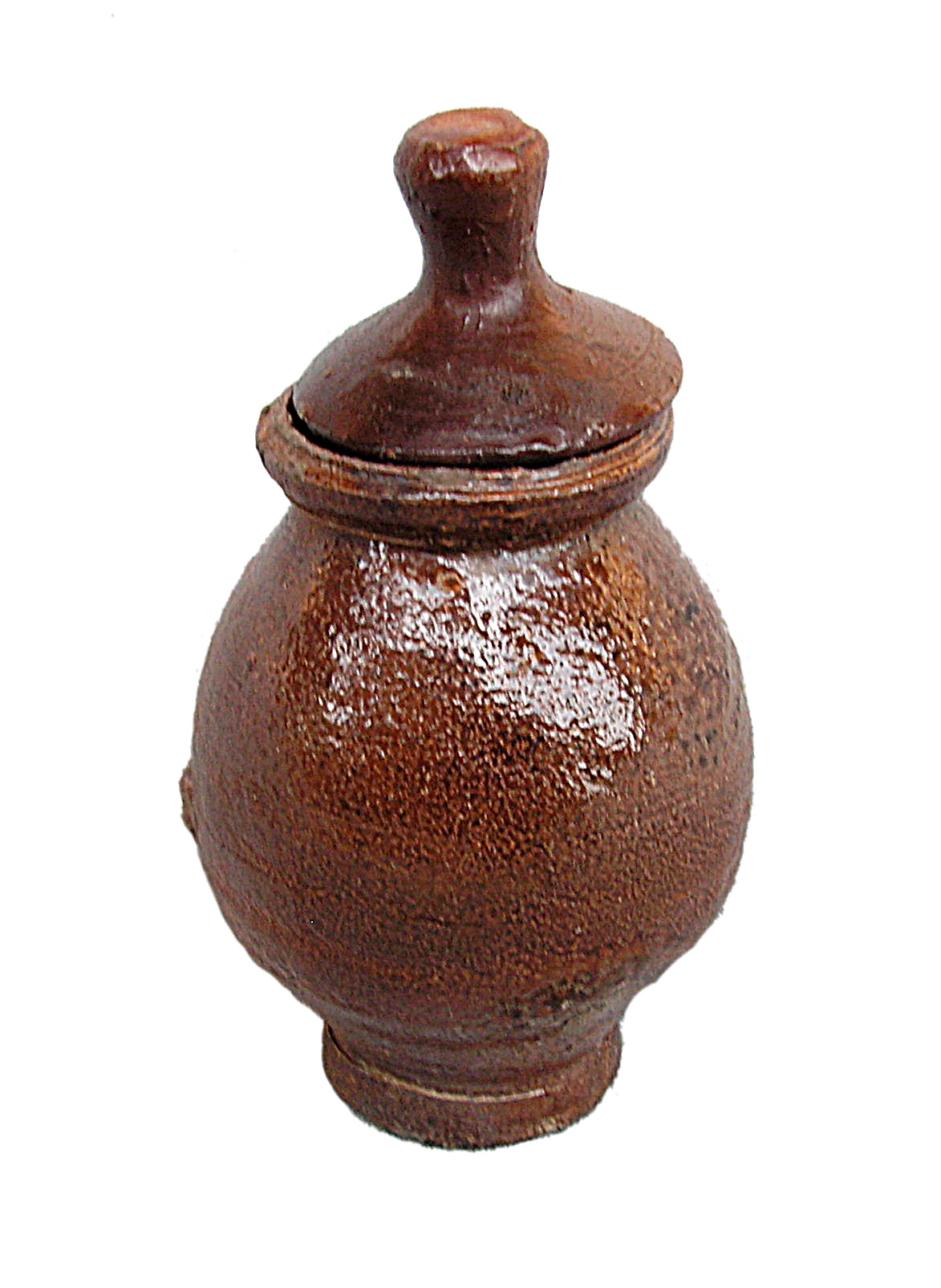 Tonflasche für Salben aus Niederbayern / Rottal